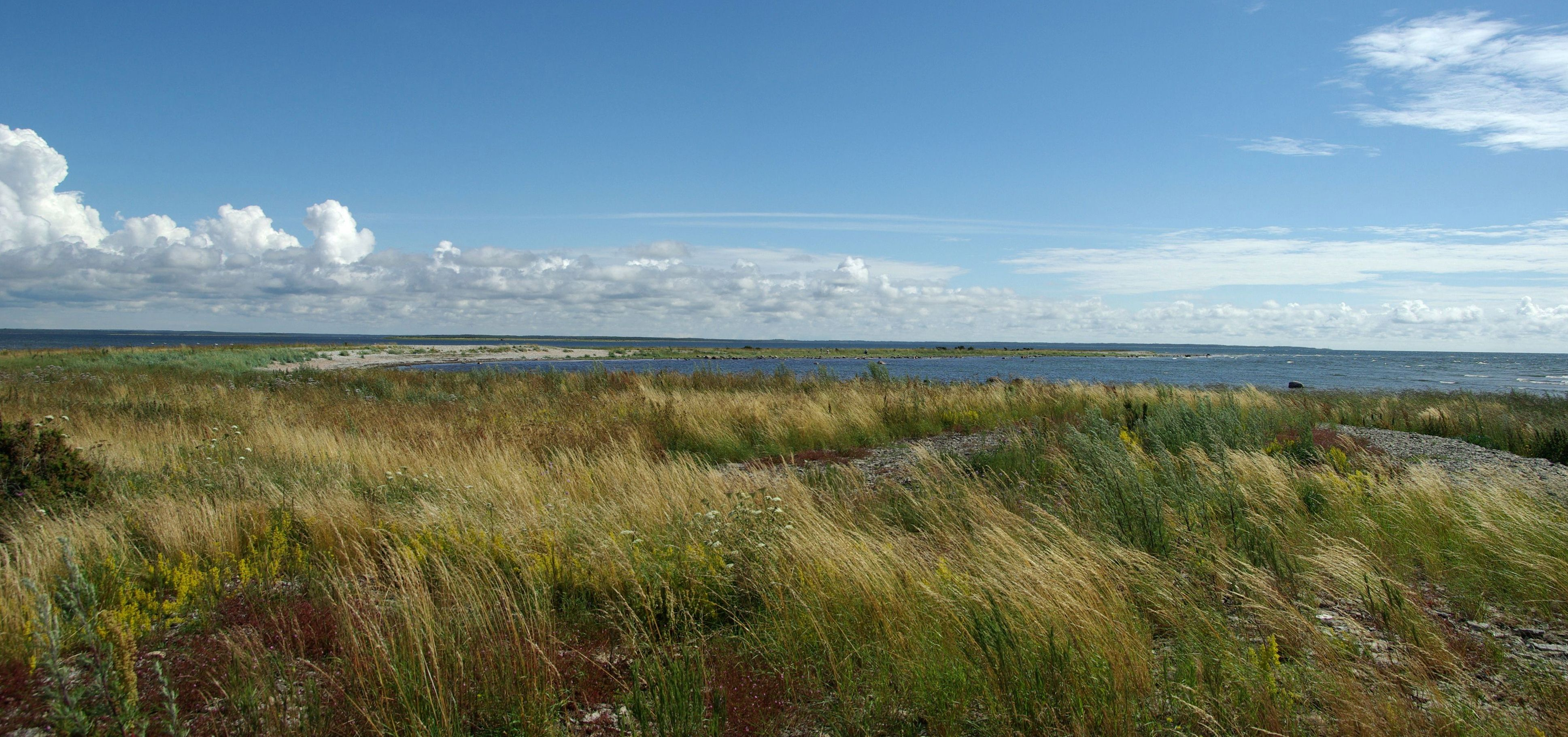 Vilsandi asub Saaremaa läänerannikul Kihelkonna ja Lümanda vallas.